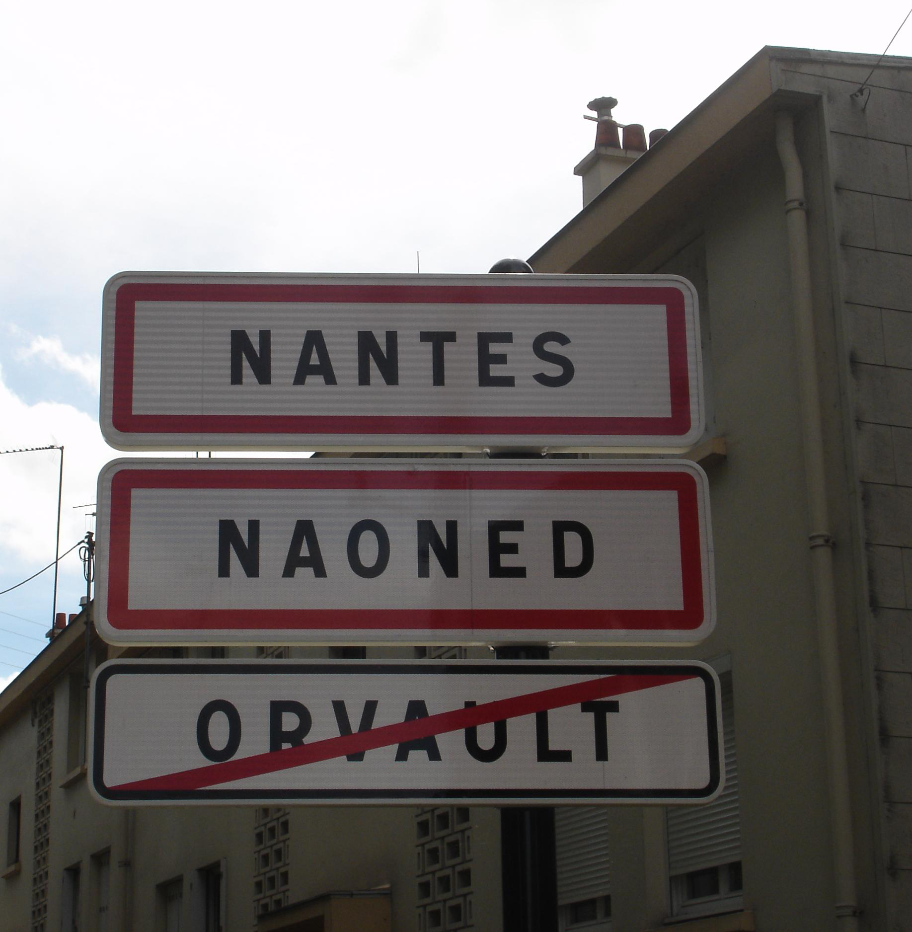 Panell mont-tre nevez staliet e Naoned - Ober 1 ar garta Ya d'ar brezhoneg votet gant kuzul-kêr Naoned.